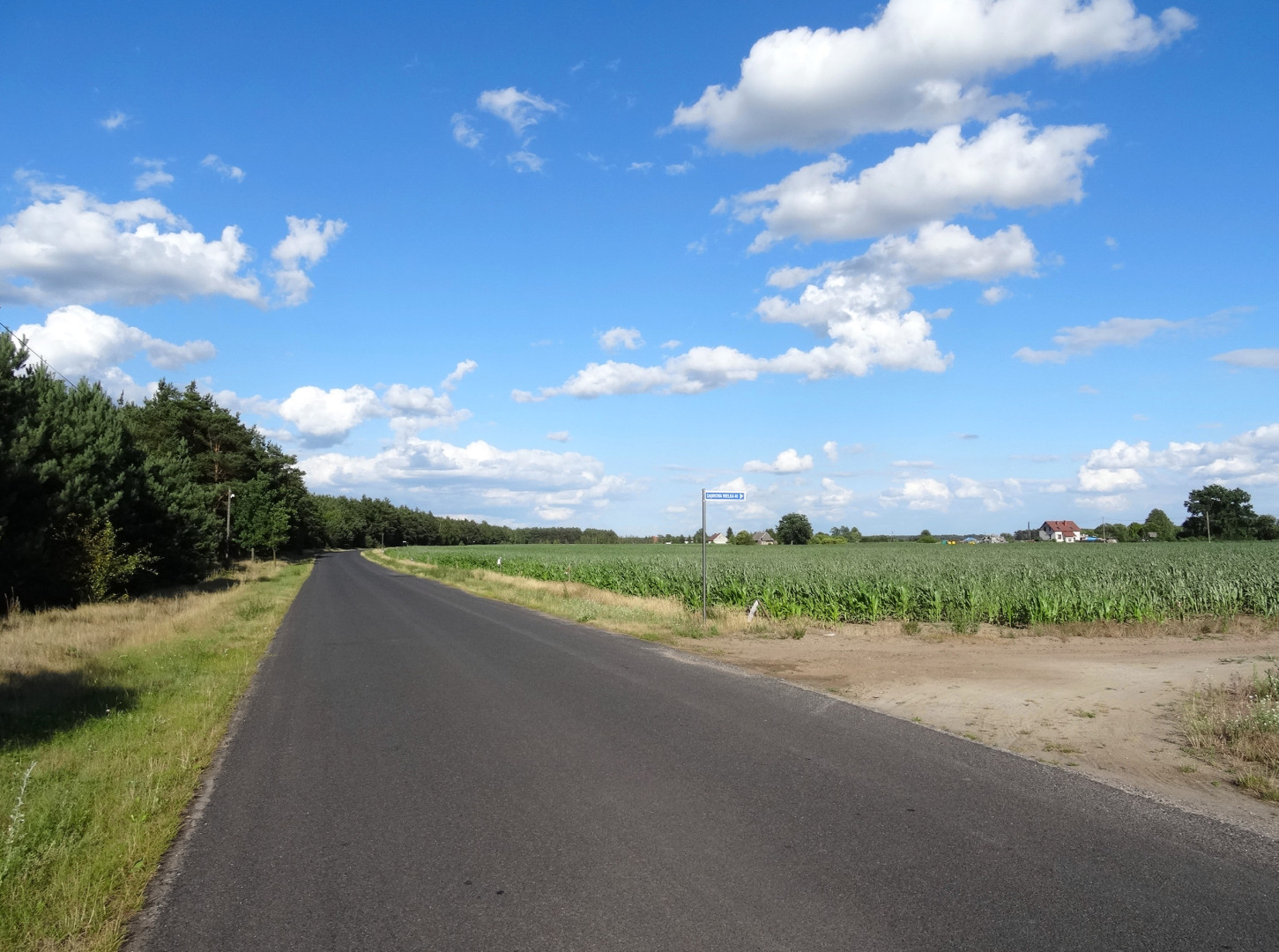 Wieś Dąbrowa Wielka, gmina Nowa Wieś Wielka, powiat bydgoski